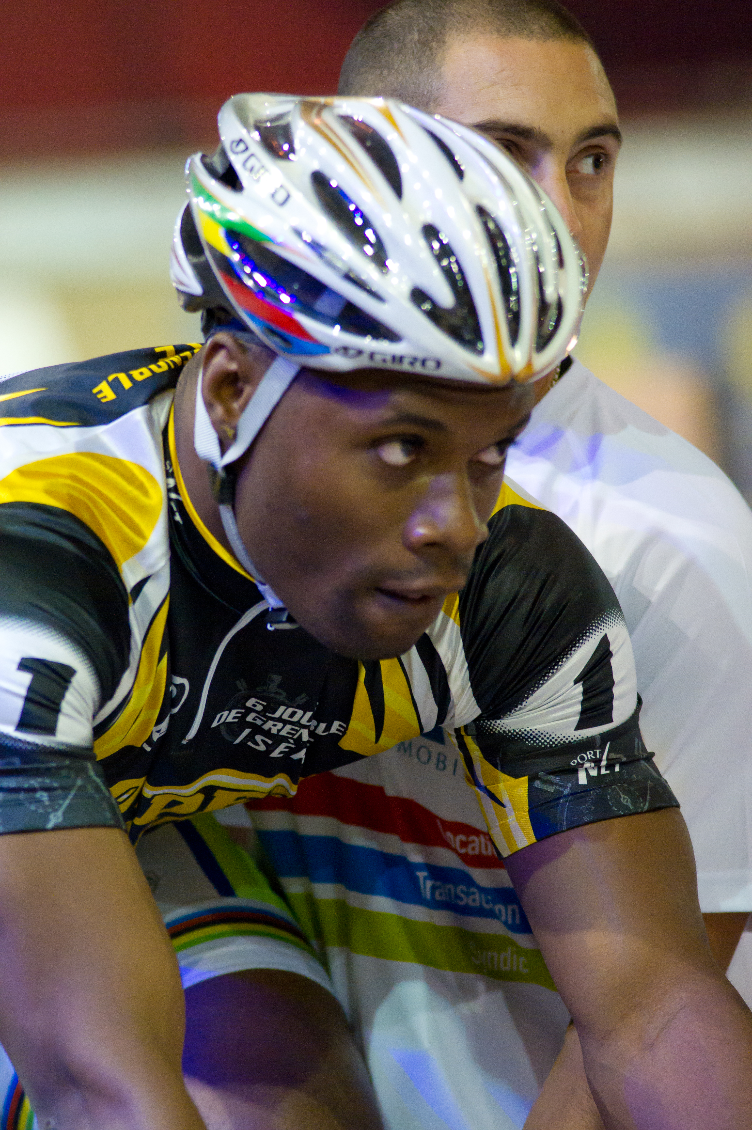 Grégory Baugé aux six jours de Grenoble 2011